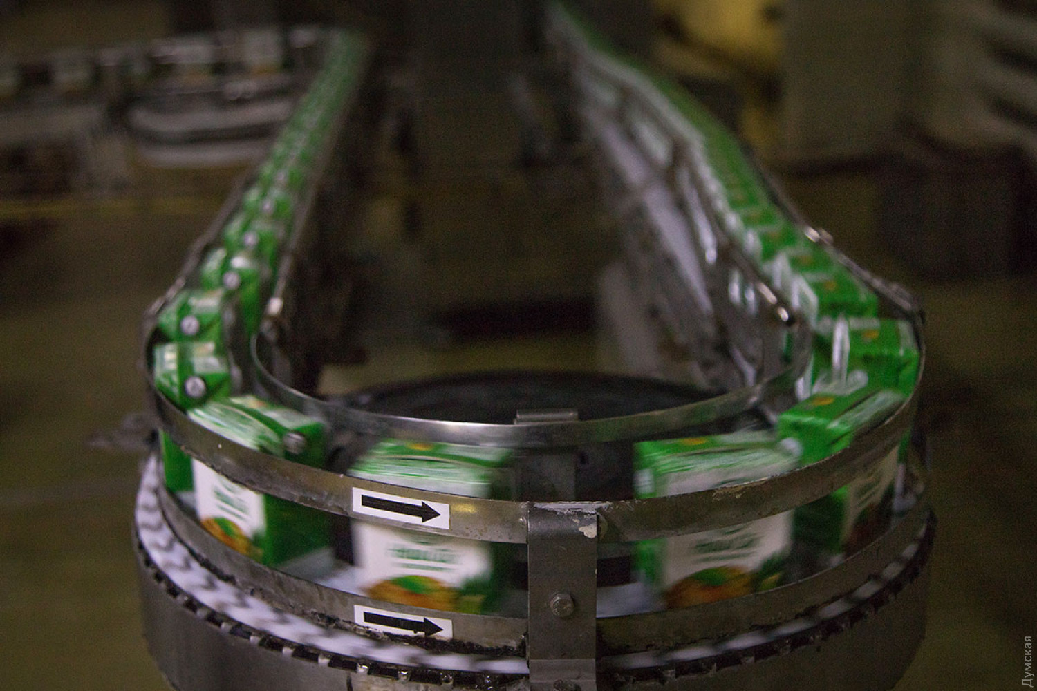 Автоматизированная линия подачи готовой продукции